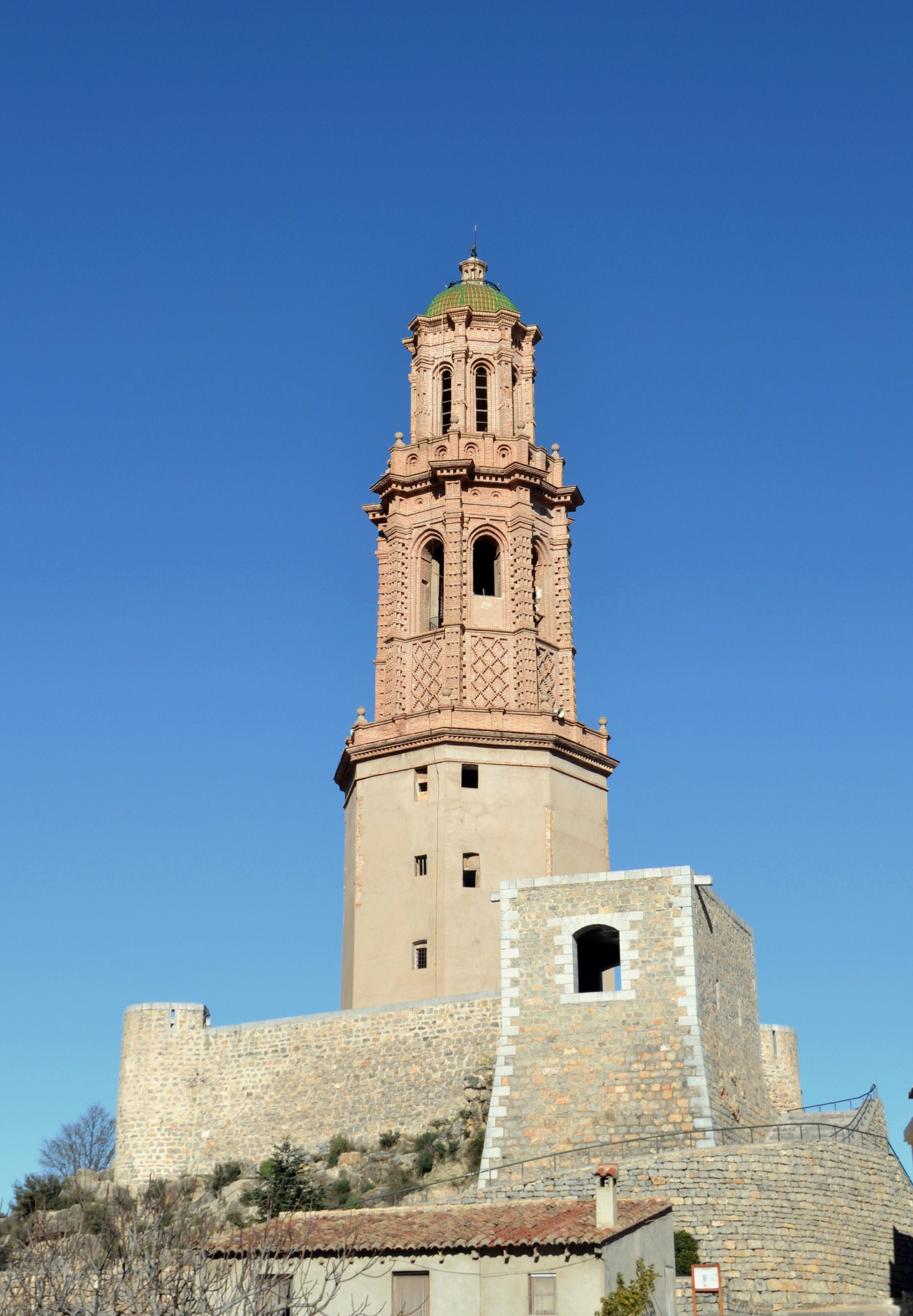 Torre de l'Alcúdia de Xèrica.